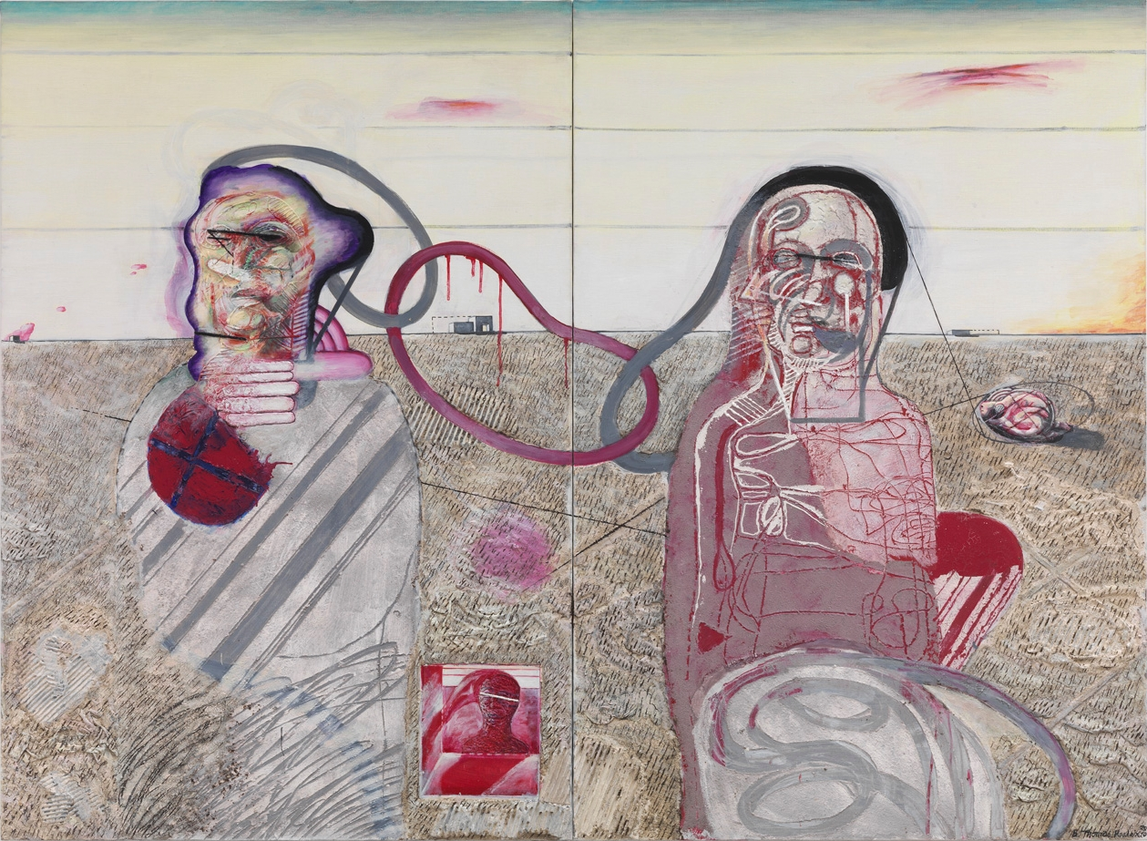 Tableau: Nous nous sommes tant aimé II (diptyque)